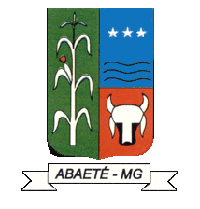 Brasão de Armas do município de Abaeté, Minas Gerais, Brasil.